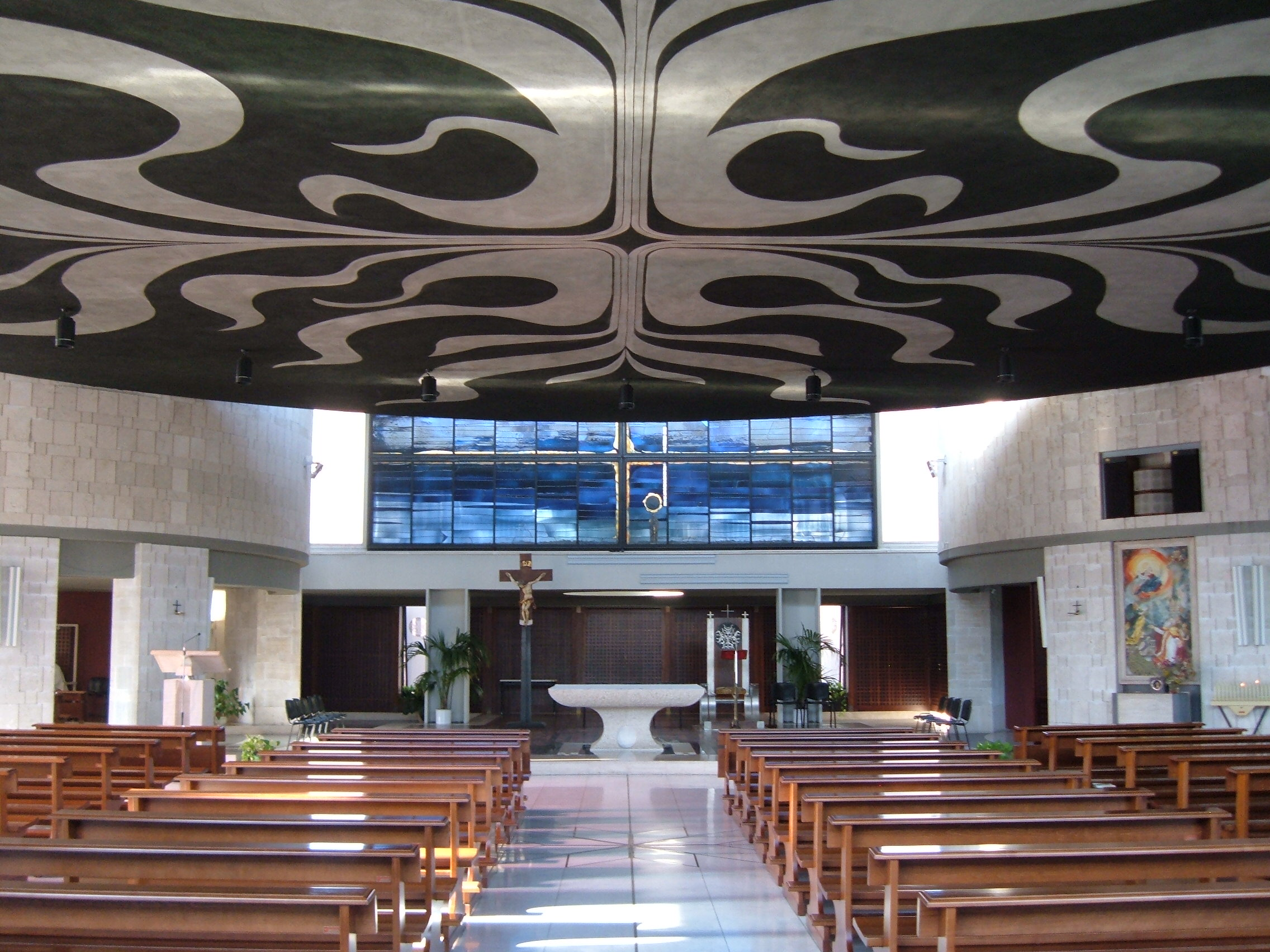 Chiesa di San Liborio, a Roma, nel quartiere Monte Sacro Alto, in via Diego Fabbri.